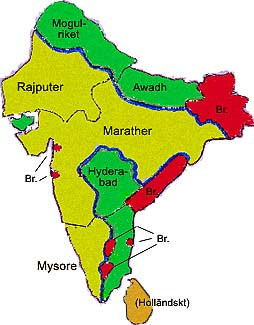 Indien, Stormogulernas rike, karta, 1790, egen tillv.